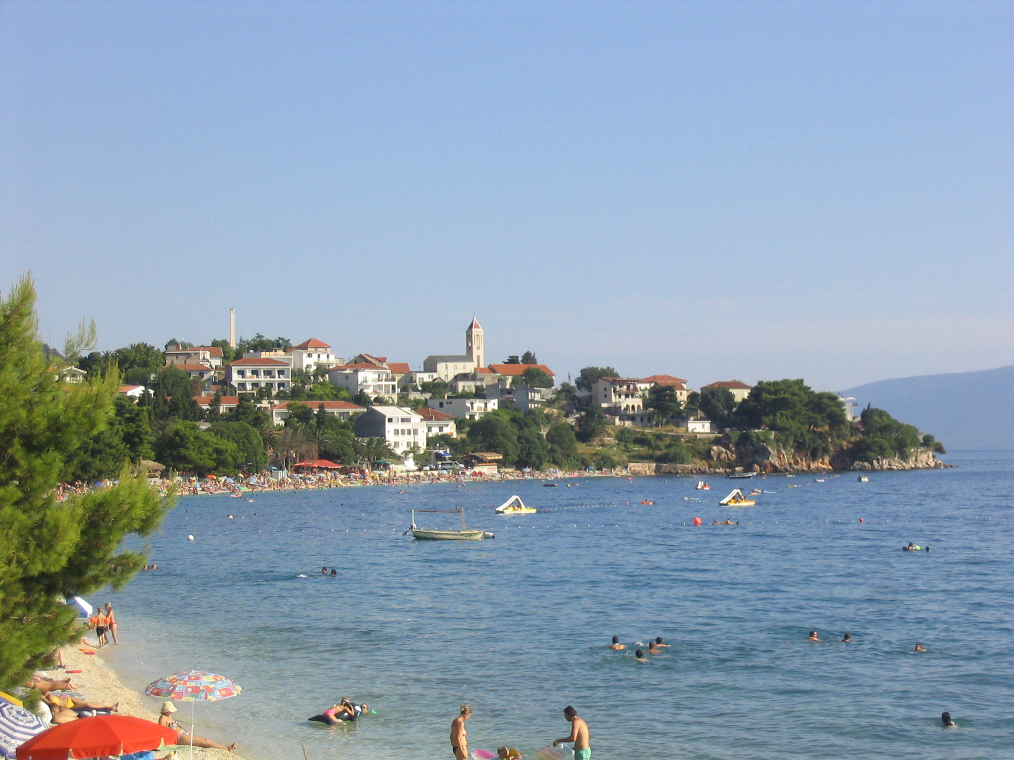 Blick auf Gradac von der Strandpromenade nach Brist aus. Aufgenommen am 11.08.2006 von Dr. Hagen Graebner